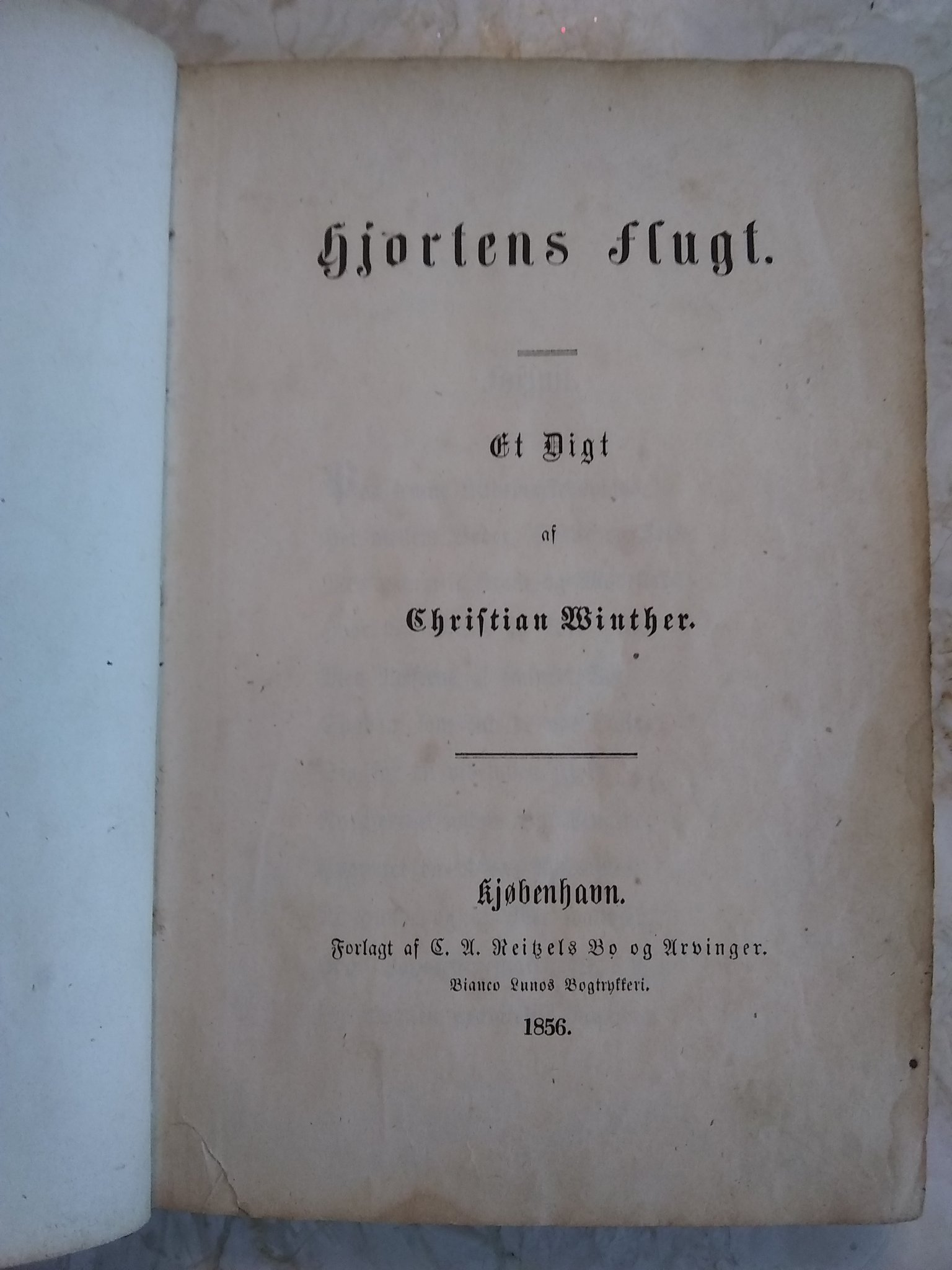 Titelbladet til førsteudgaven af Hjortens Flugt (1855).